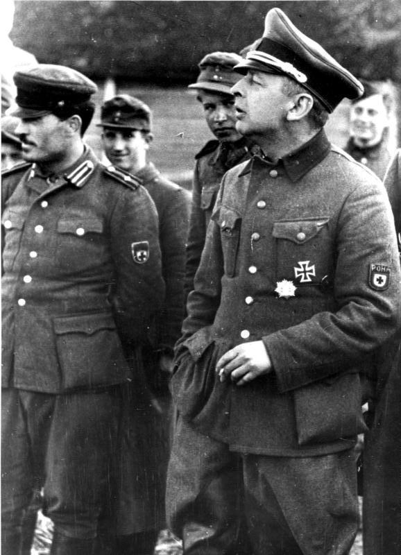 Russen kämpfen gegen Bolschewisten, Vom Führer mit dem Eisernen Kreuz I. [Klasse] ausgezeichnet, hatte der Brigadekommandeur landeseigener Freiwilliger, [Borislaw] Kaminski, hervorragenden Anteil an der Vernichtung bolschewistischer Banden im Osten. Sachklassifikation/ E(Zweiter Weltkrieg 1939-1945)/ Ec (Wehrmacht)/ Ec 300 (Freiwillige anderer Nationalitäten in der Wehrmacht)/ Ec 360 (Aus der Sowjetunion)/ Ec 361 (Russen) Sachklassifikation/ E (Zweiter Weltkrieg 1939-1945) / Ec {Wehrmacht} /Ec 700 (Partisanen, Partisanenbekämpfung) Foto: PK-Wehmeyer